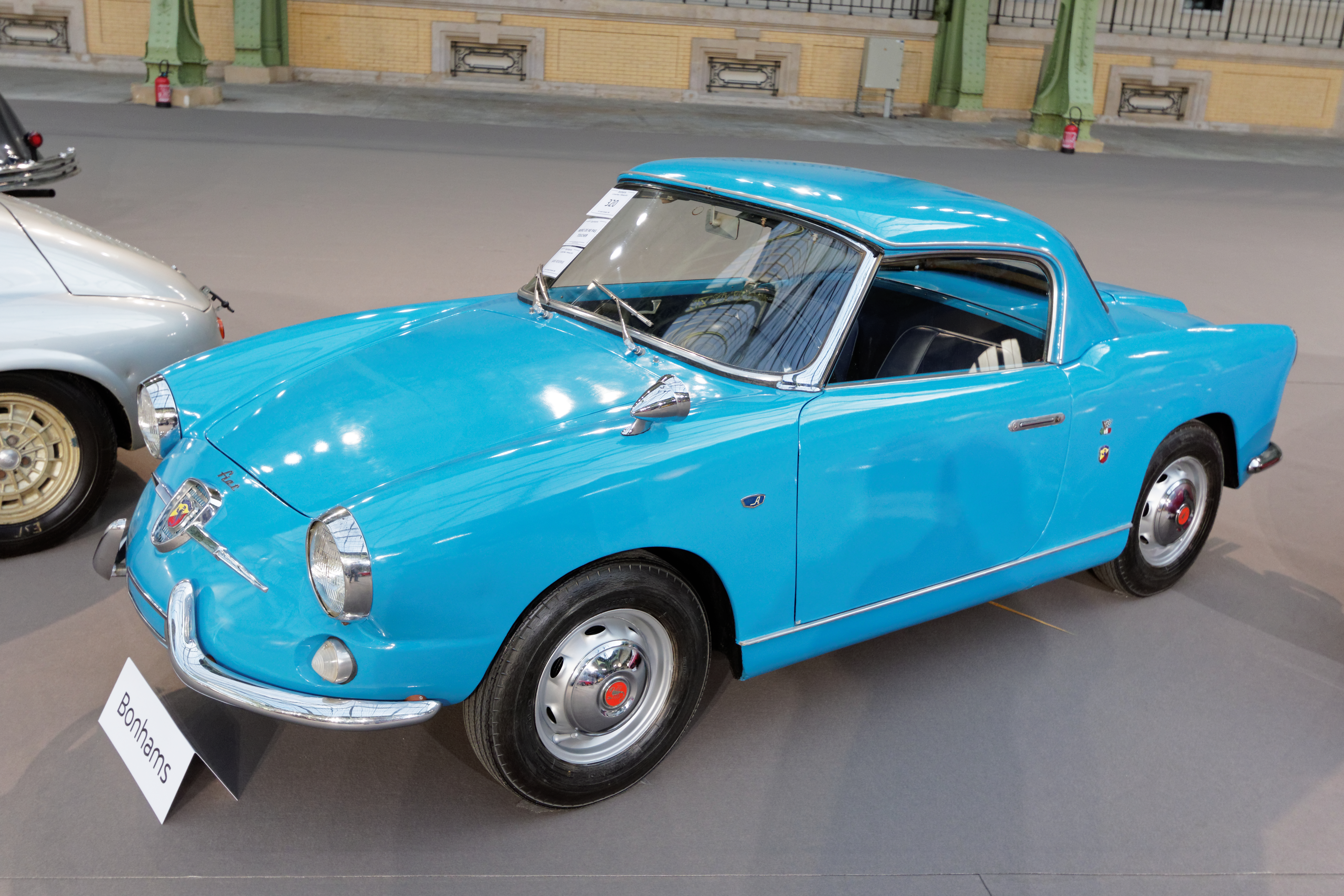 Un des véhicules présenté lors de la vente aux enchères Bonhams 2015 au Grand Palais de Paris.